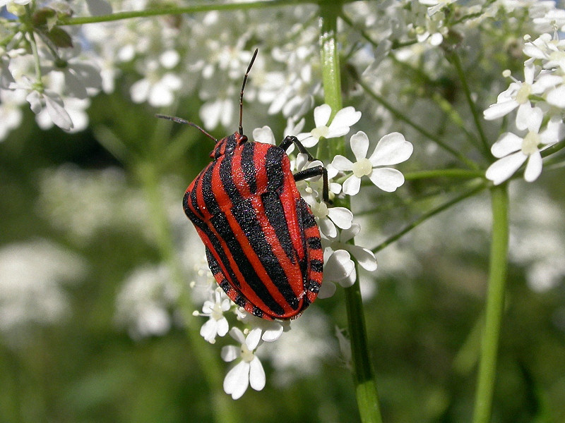 Streifenwanze, Graphosoma italicum, Nationalpark Hainich, Thüringen, Baumwipfelpfad, Germany